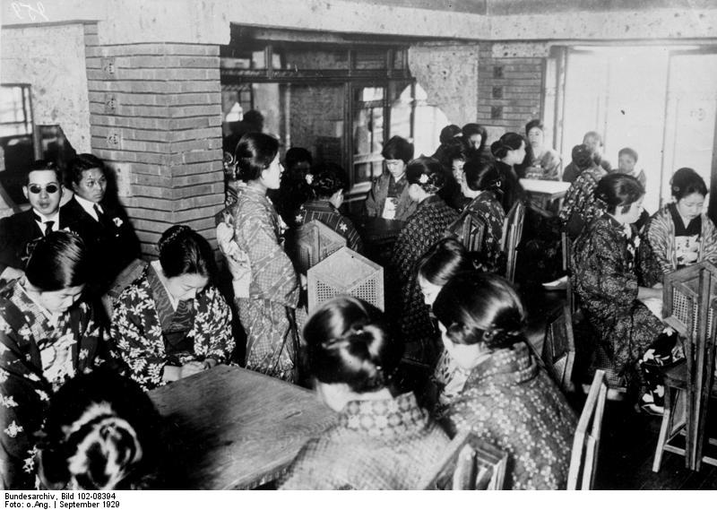 Das Clubheim japanischer Studentinnen in Tokio! Das Clubheim hat die strenge Vorschrift, innerhalb seiner Räume nur die Nationaltracht zu tragen.